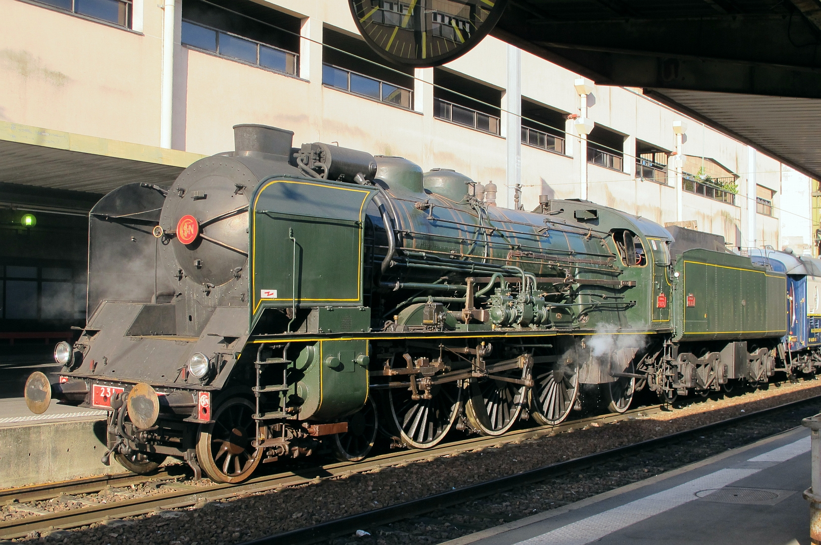 La 231 K 8 en gare de Paris-Lyon le 15 septembre 2013.